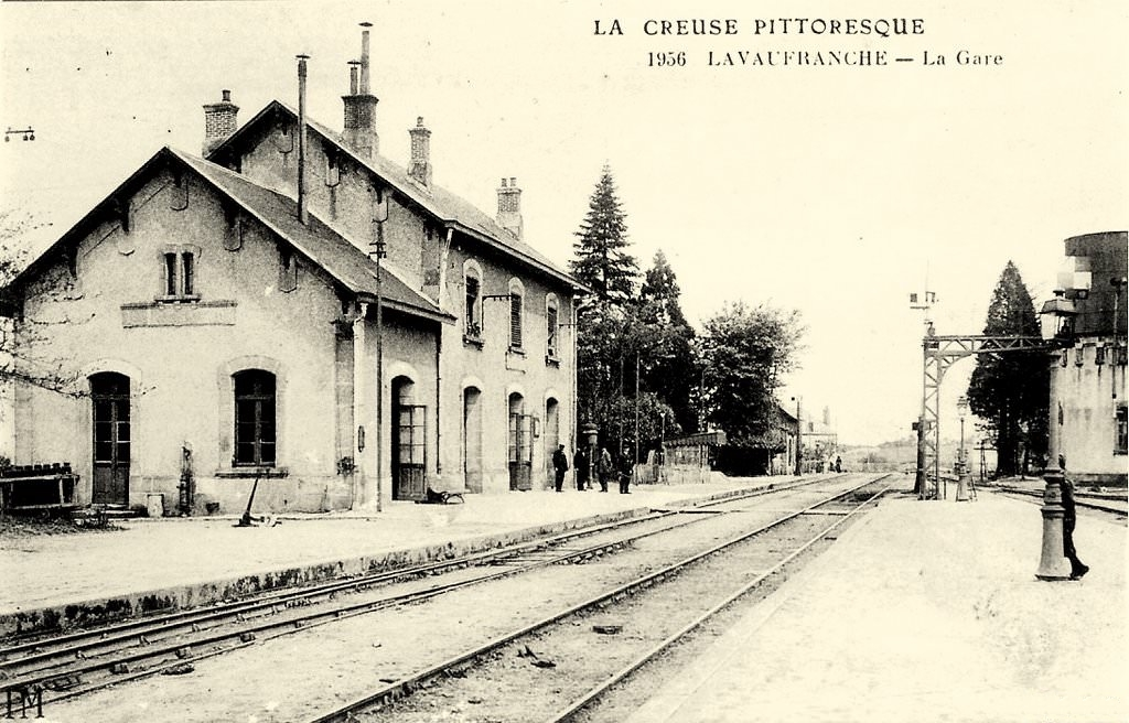 Carte postale de la gare vers 1920.